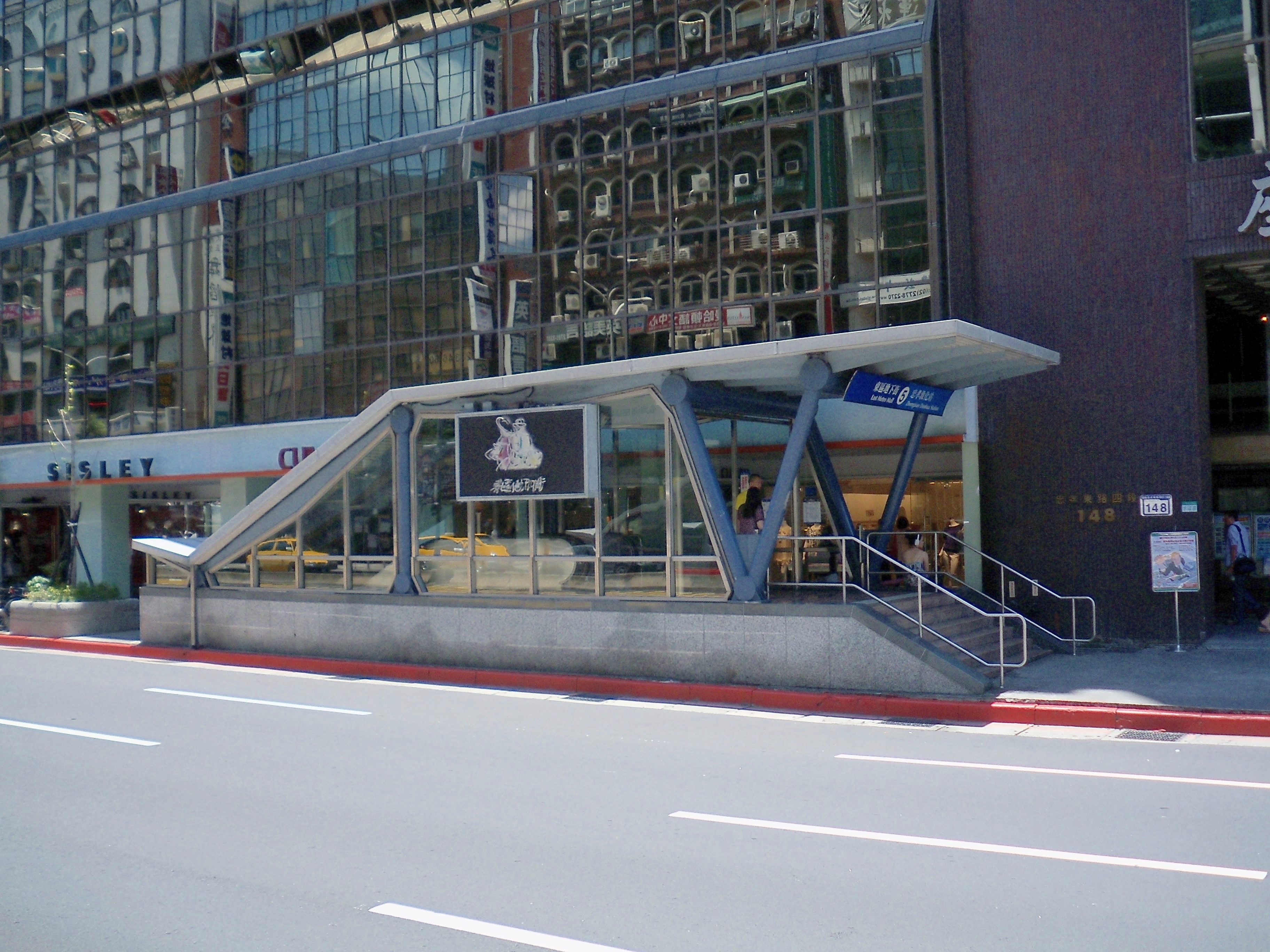 台北捷運忠孝敦化駅5号出口。中文（台灣）: 台北捷運忠孝敦化站5號出口，位於臺北市大安區忠孝東路四段148號前，外牆掛東區地下街標誌霓虹燈招牌。